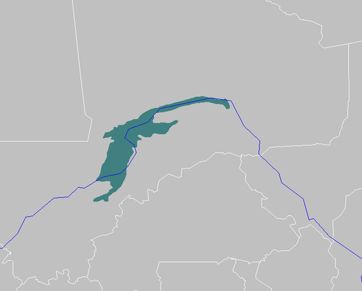 Inner Niger Delta flooded savanna ecoregion map